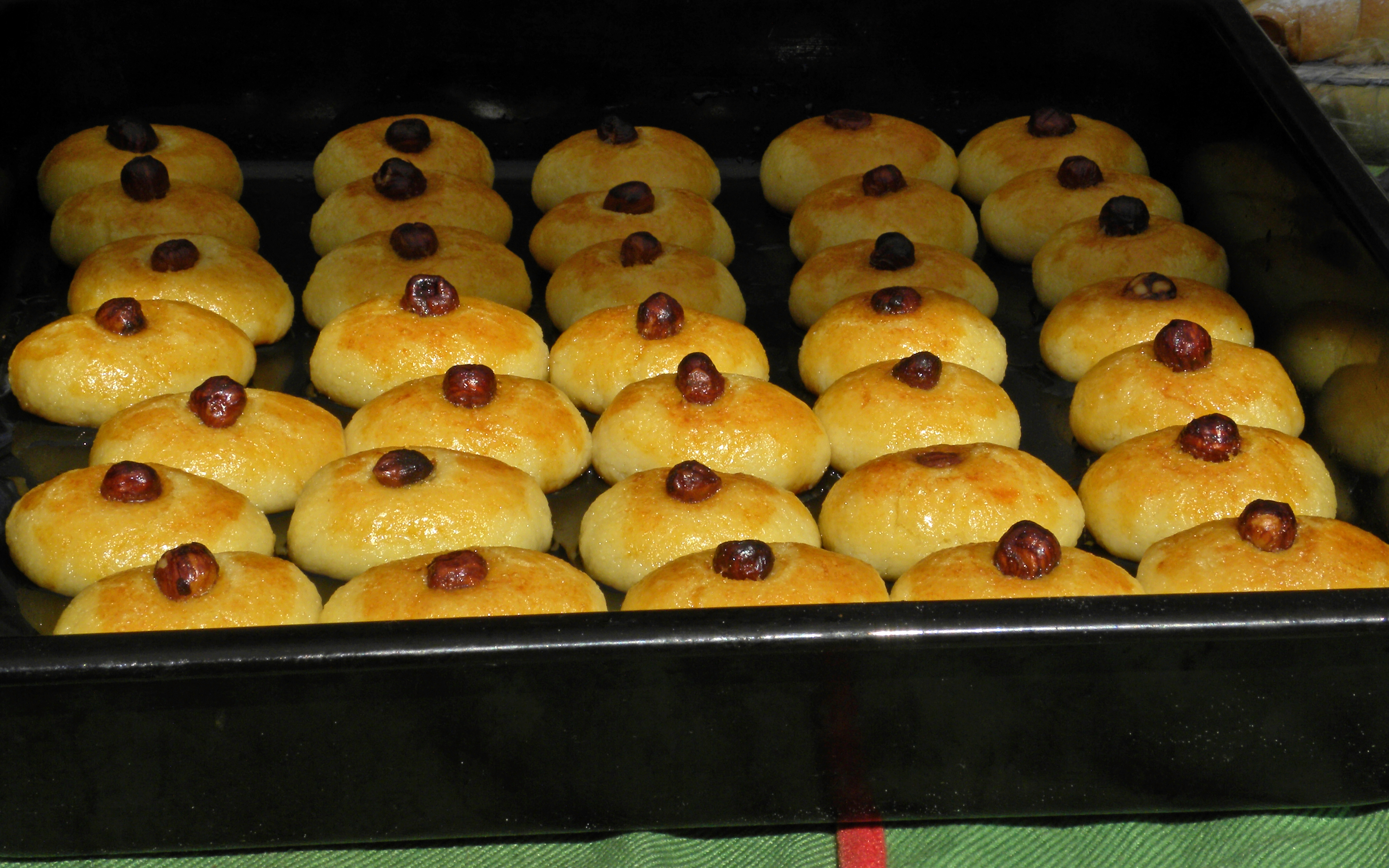 Spezialitäten am türkischen Stand beim Wasserweltfest 2012 im Wiener Vogelweidpark